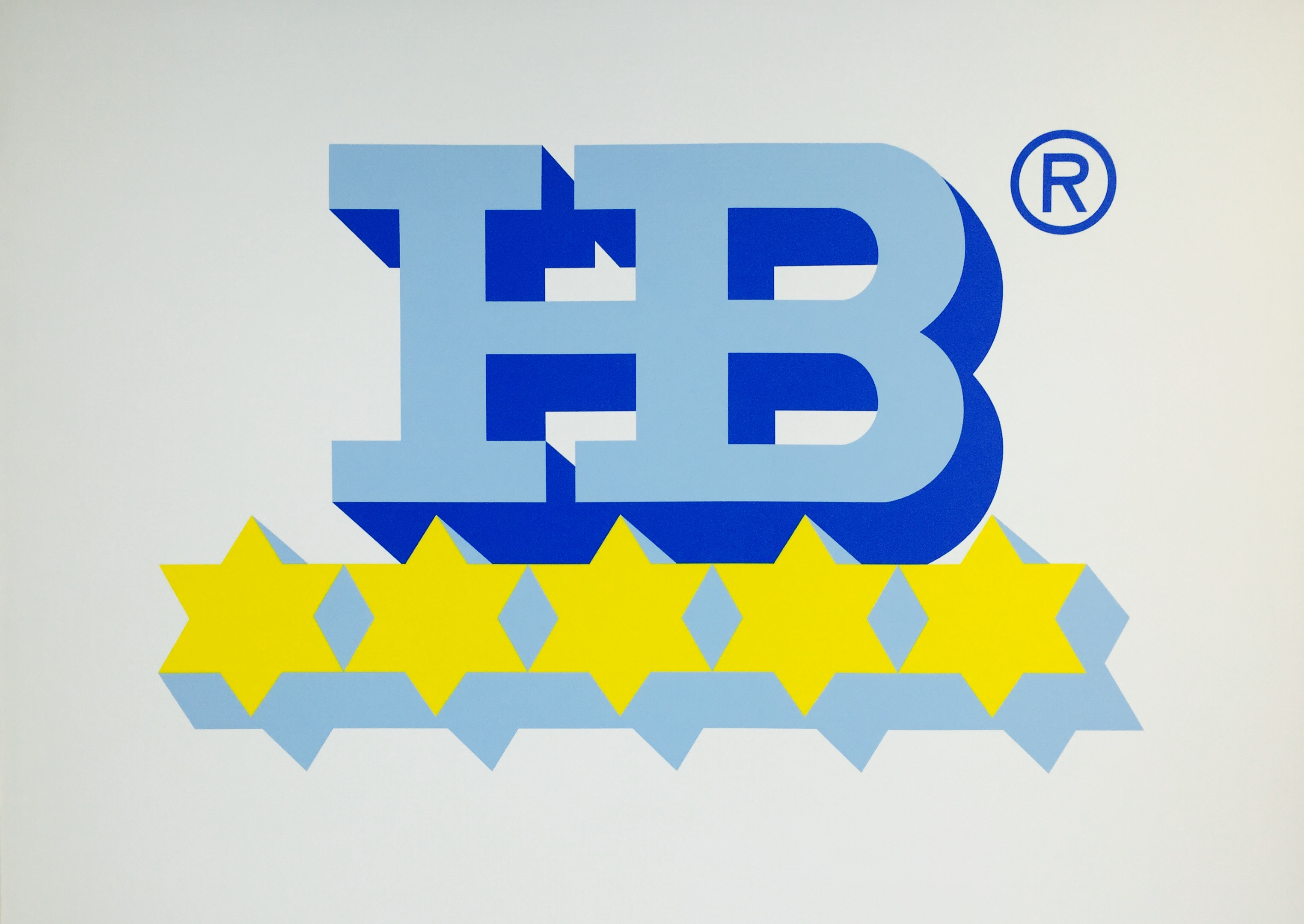 HB-Betoniteollisuus Oy:n tunnus